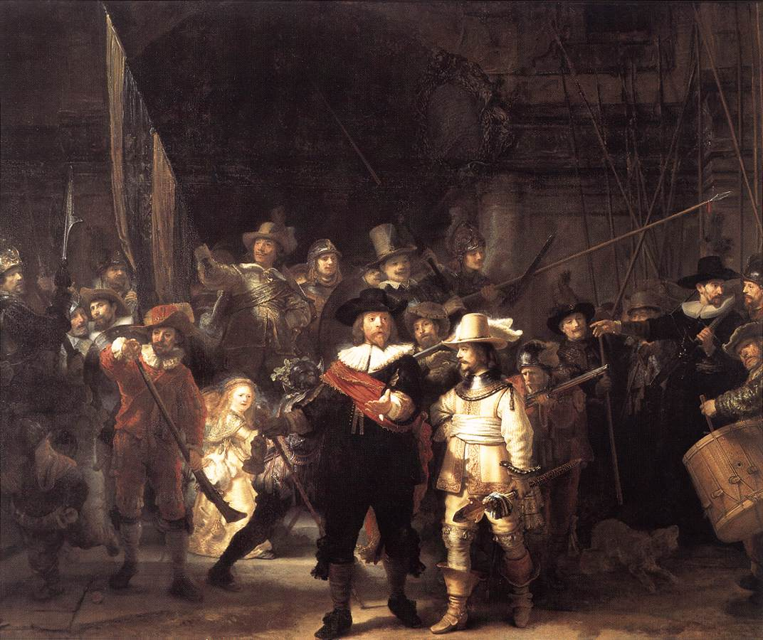 Frans Banning Cocq, heer van purmerlant en Ilpendam, Capiteijn Willem van Ruijtenburch van Vlaerdingen, heer van Vlaerdingen, Luijtenant, Jan Visscher Cornelisen Vaendrich, Rombout Kemp Sergeant, Reijnier Engelen Sergeant, Barent Harmansen, Jan Adriaensen Keyser, Elbert Willemsen, Musketier Jan Clasen Leydeckers (behind the Lieutenant in Yellow blowing into the powder pan of a musket which once belonged to Jan Snedeker), Jan Ockersen, Jan Pietersen bronchorst, Harman Iacobsen wormskerck, Jacob Dirksen de Roy (the Governor on far left of the cut off section of the painting), Jan vander heede, Walich Schellingwou, Jan brugman, Claes van Cruysbergen, Paulus Schoonhoven